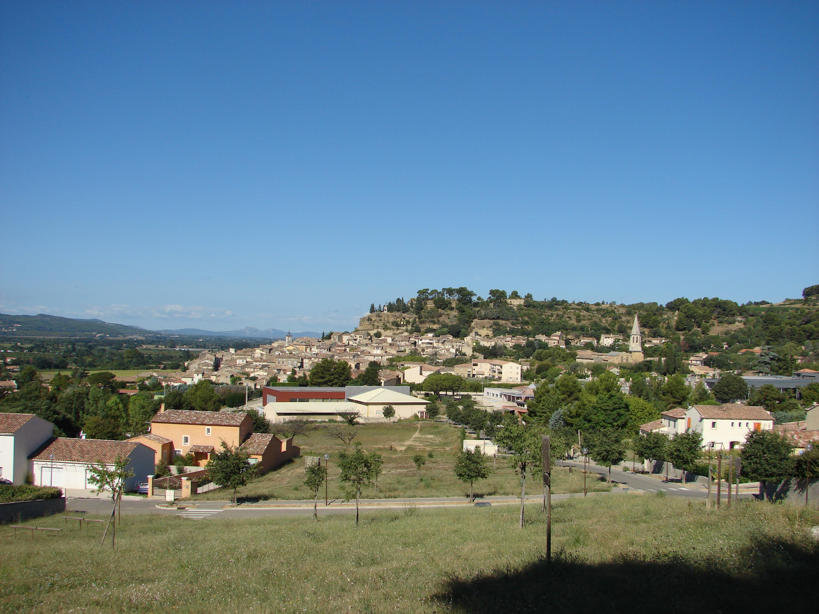 Photographie grand champ de Cadenet prise de l’est.